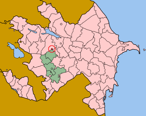 Map of Azerbaijan showing Naftalan sahar.